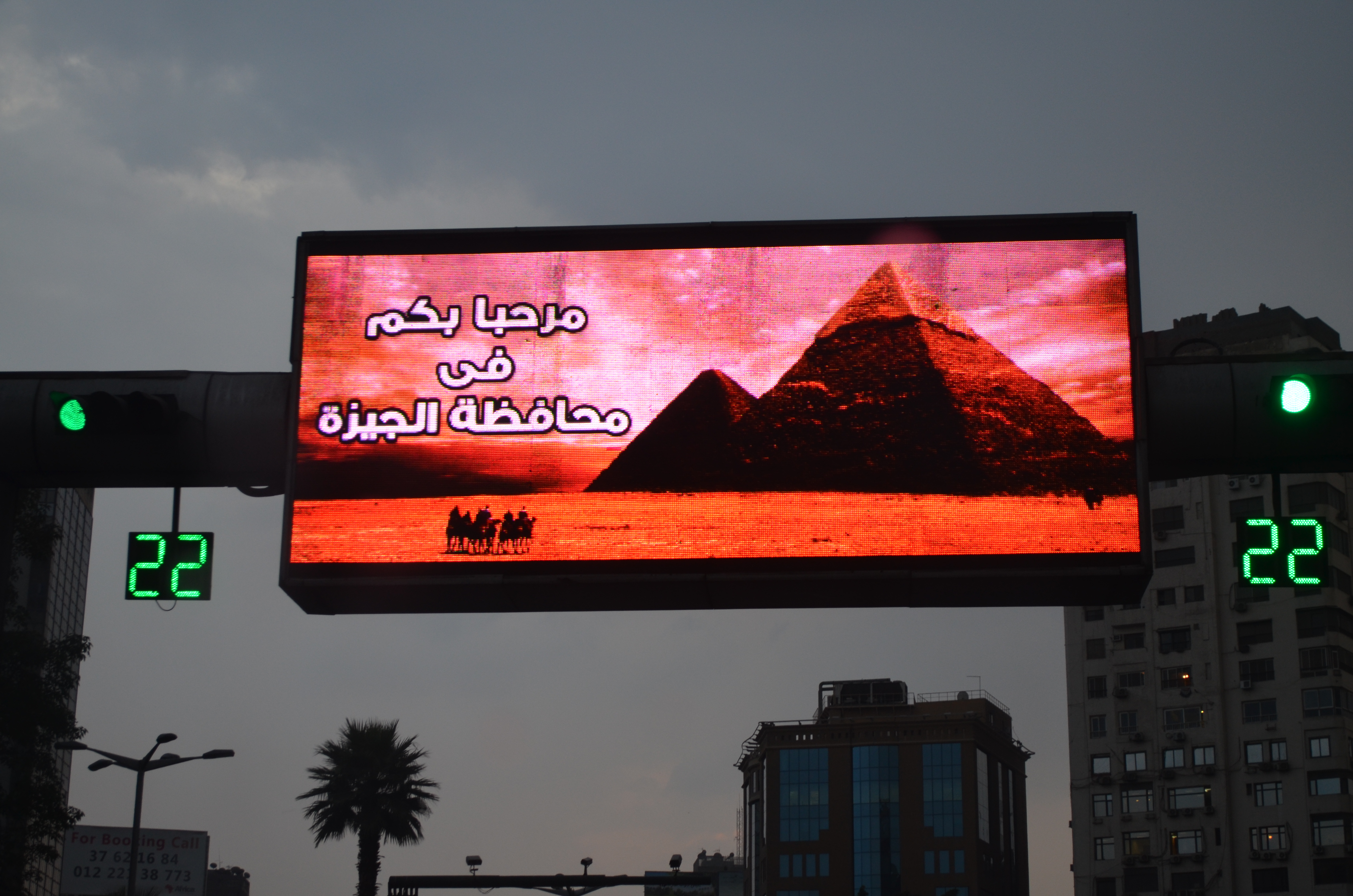 لافتة ترحبية بمحافظة الجيزة مزودة بإشارة مرور